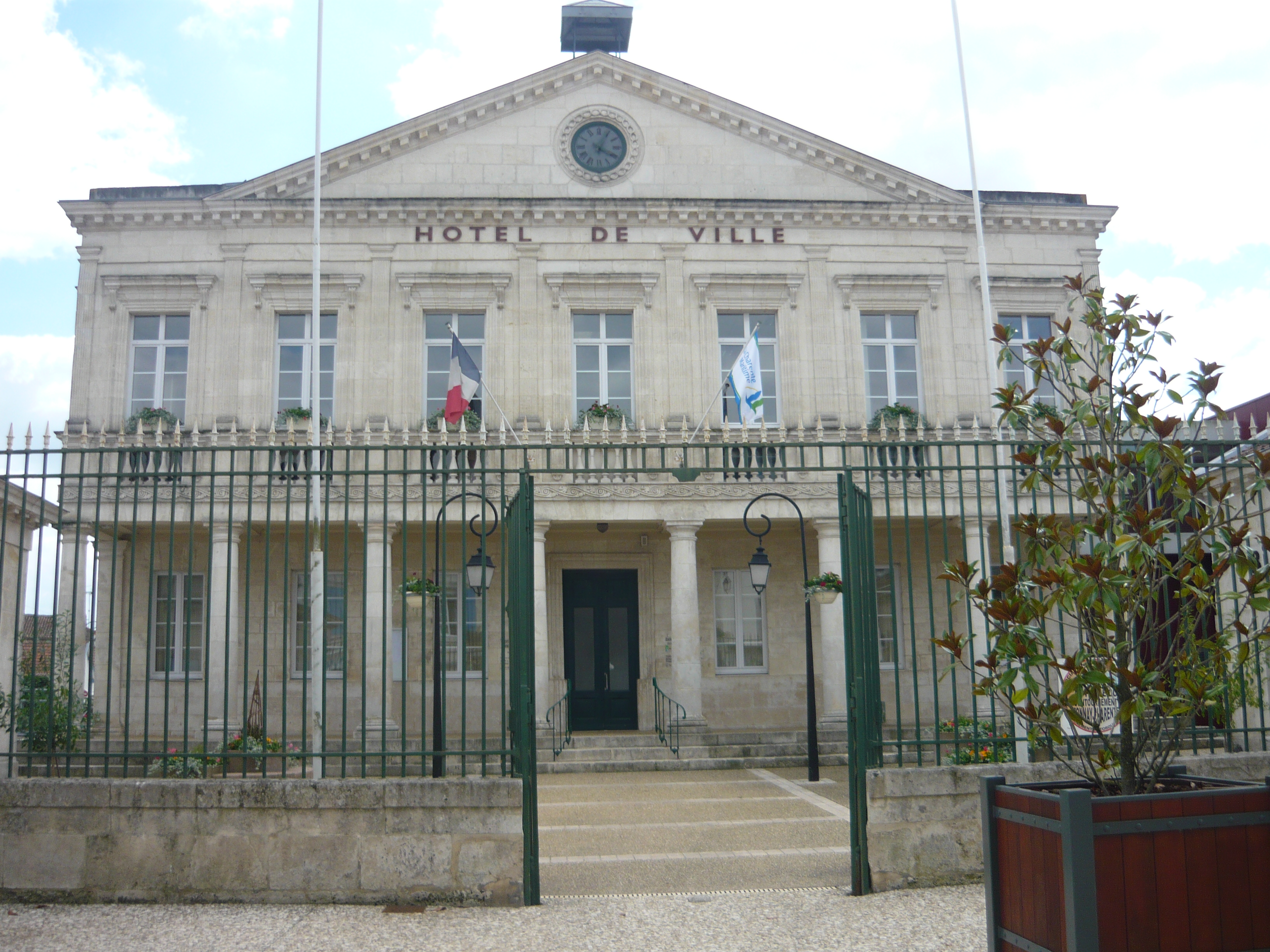 L'Hôtel de ville de Tonnay-Charente a été édifié en 1846 au cœur de la ville.